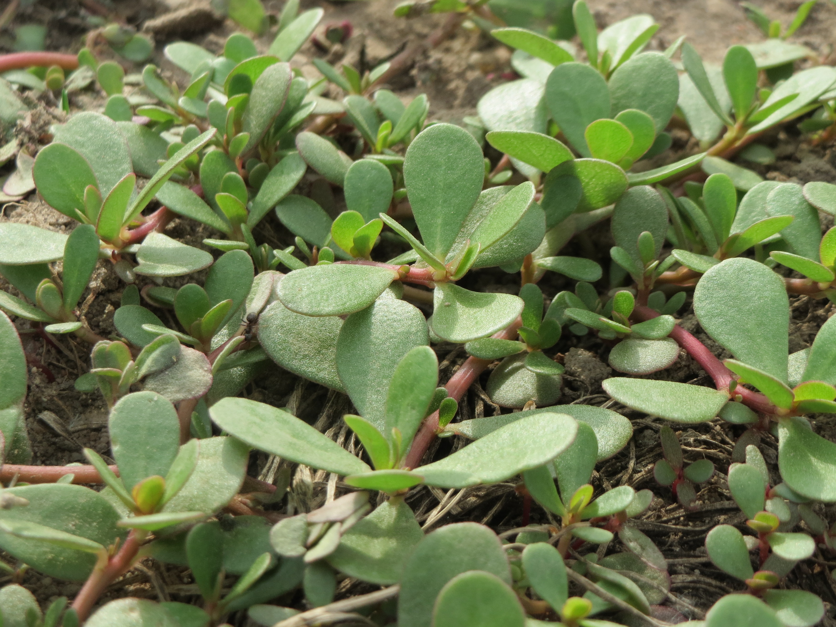 Portulak (Portulaca oleracea) bei Reilingen